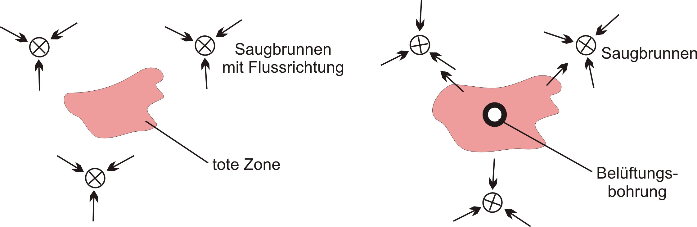 Absaugen von schädlichen Dämpfen und Gasen aus der Erdschicht über dem Grundwasser. Anwendungsprinzip, Einfluss von Belüftungsbrunnen auf die Funktion.